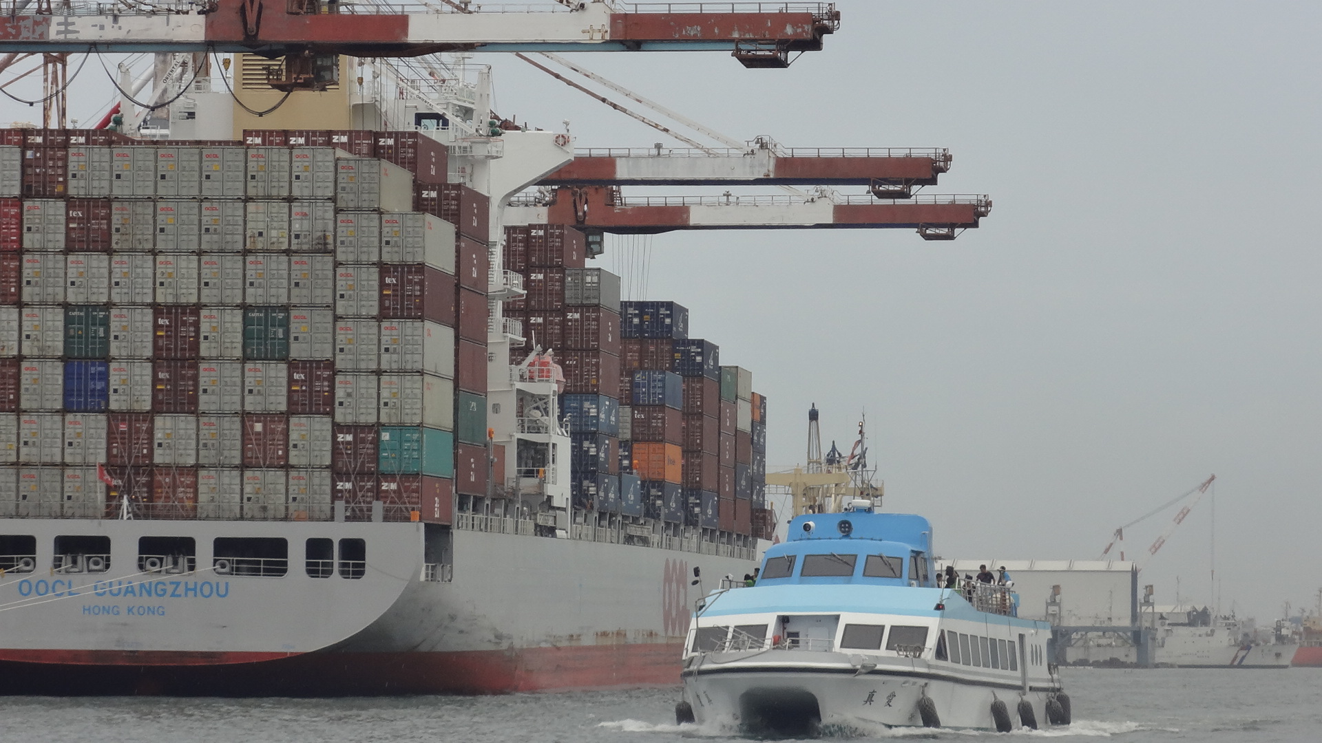 高雄港觀光遊港輪。